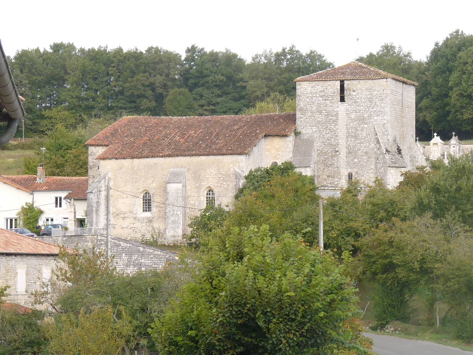 église de Parzac, Charente, France